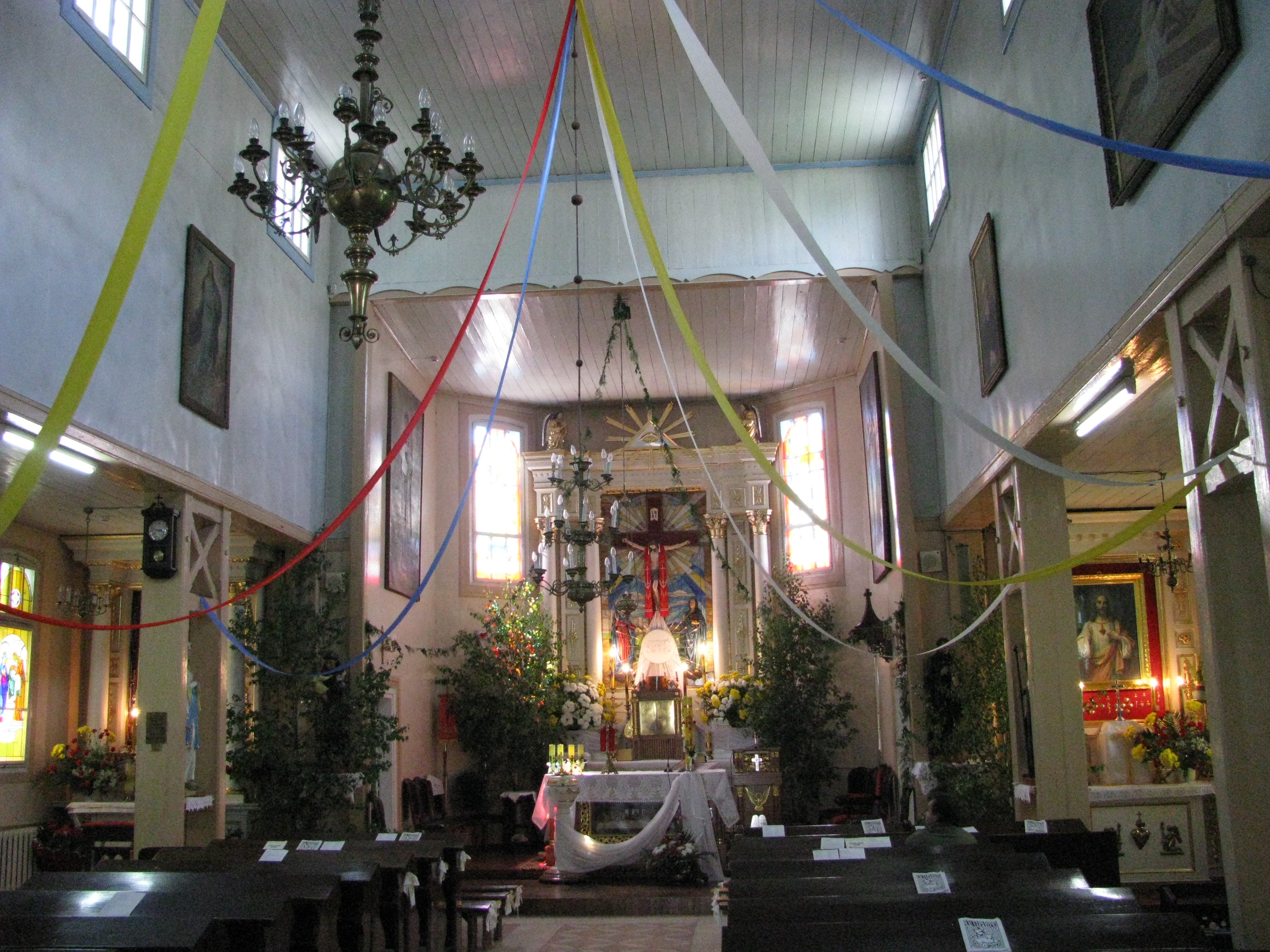 Беларуская (тарашкевіца): Касьцёл Узьвіжаньня Сьвятога Крыжа. г. Баранавічы This is a photo of Belarusian heritage monument. Reference number: 113Г000042 ( WLM)